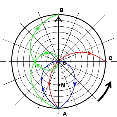 Mobile M sur une trajectoire rectiligne AB vu depuis un repère en rotation suivant un axe 0 (vitesses constantes).